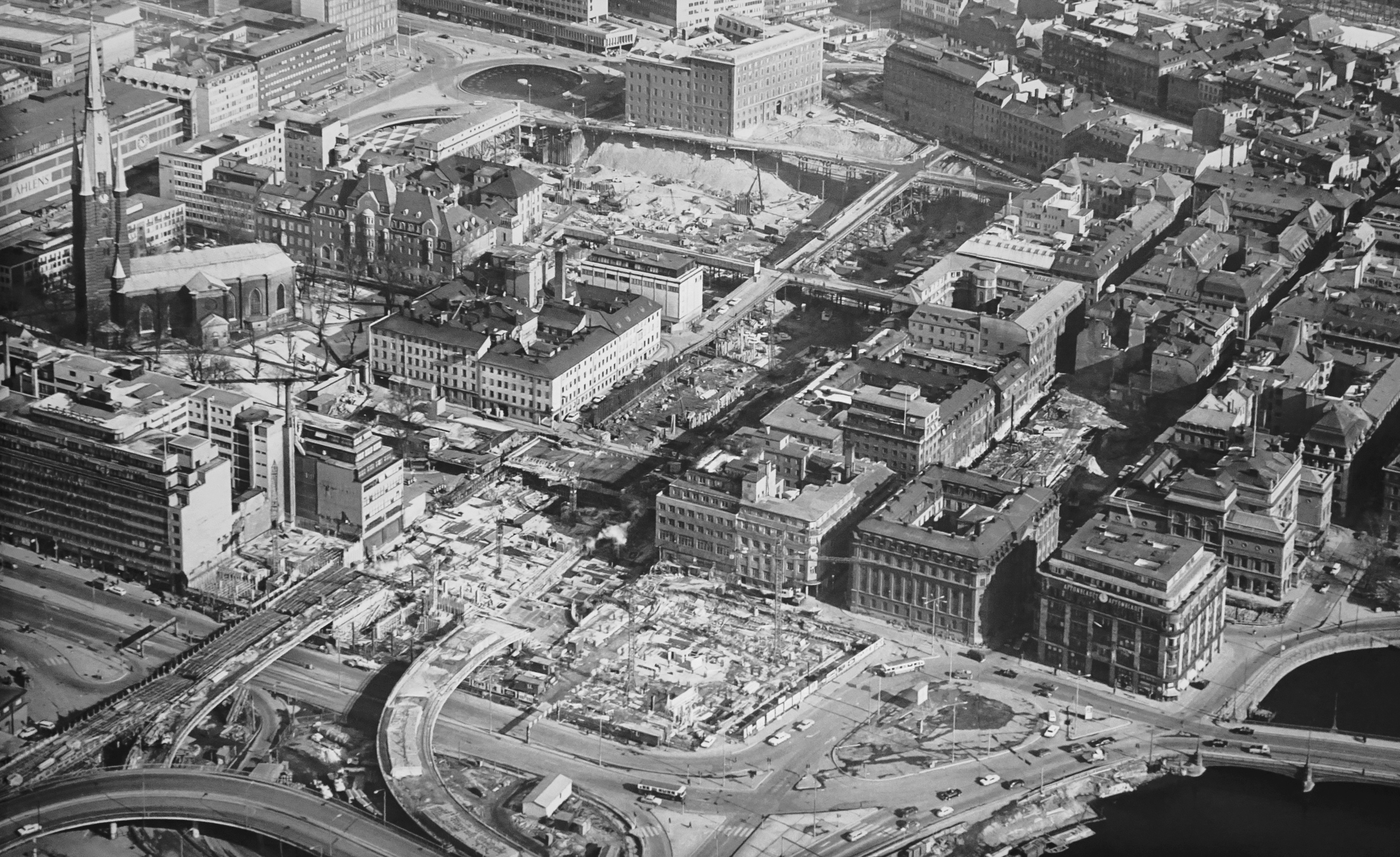 Klarakvarteren i Stockholm. Beskuren version av File:Stockholms innerstad - KMB - 16001000370384.jpg